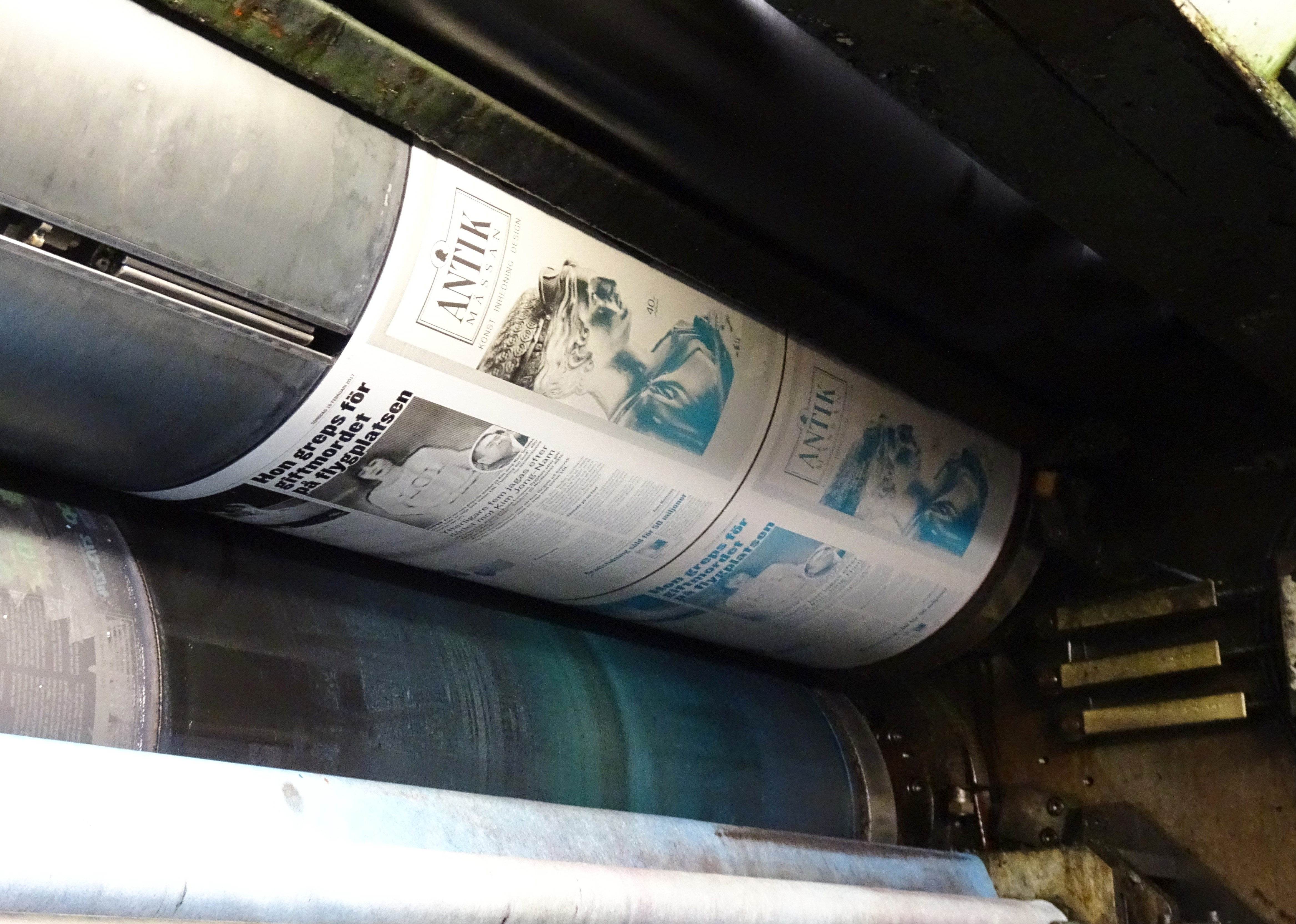 DNEX-Tryckeriet, Manroland Colorman tryckpress